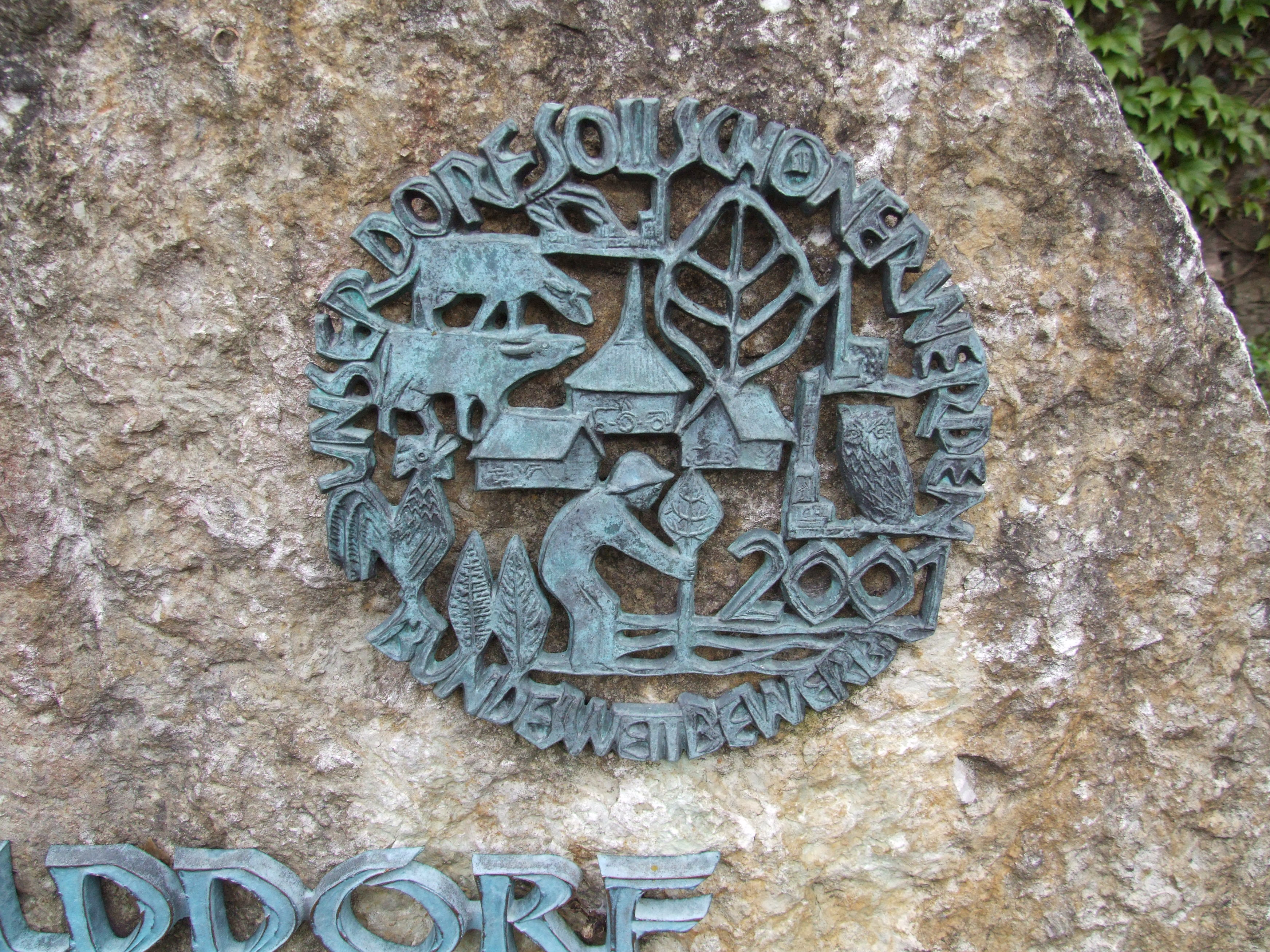 Unser Dorf soll schöner werden - 2001 die Goldmedaille auf Bundesebene - Ehrenstein in Niedergailbach - Detail Emblem